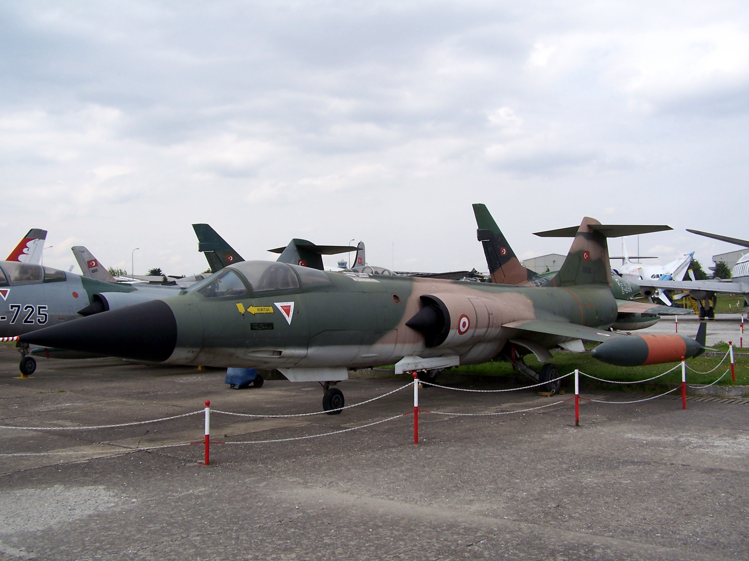 Aeritalia F-104 S Star Fighter in Istanbul Aviation Museum (İstanbul Havacılık Müzesi)